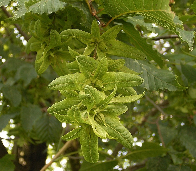 Carpinus betulus